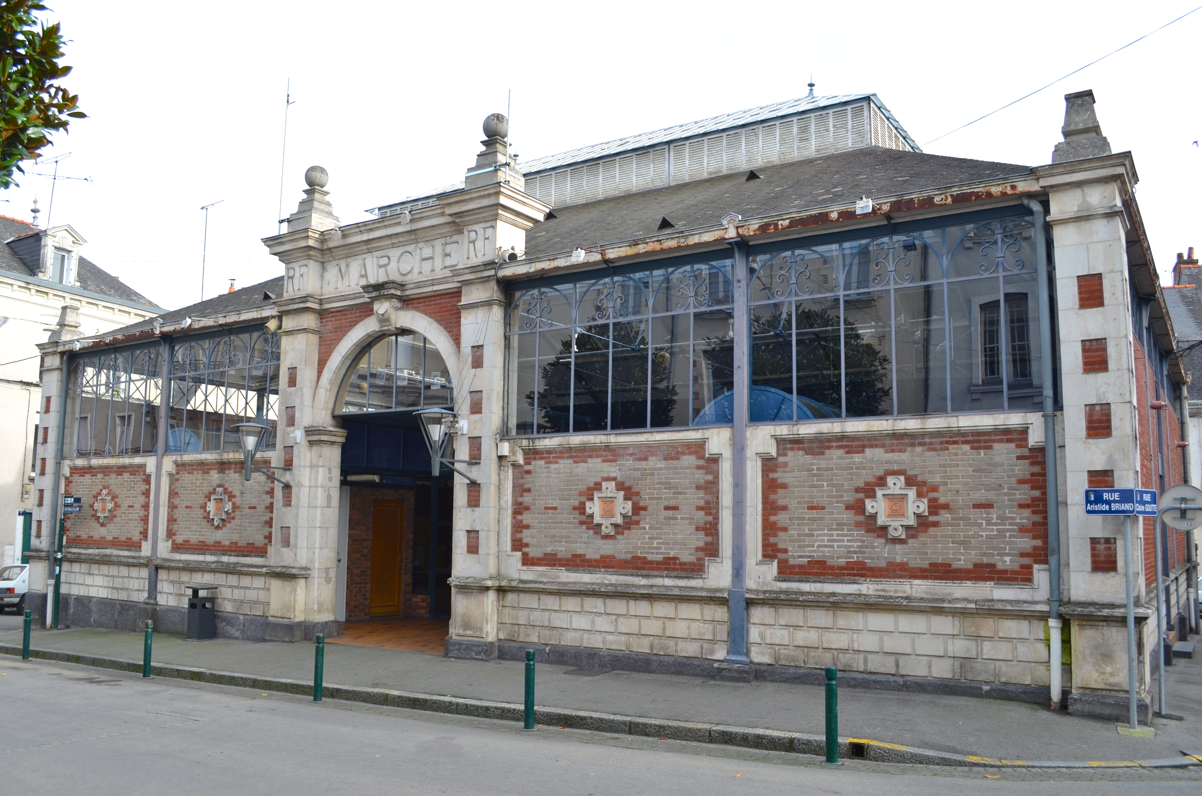 Halles - Châteaubriant (Loire-Atlantique)